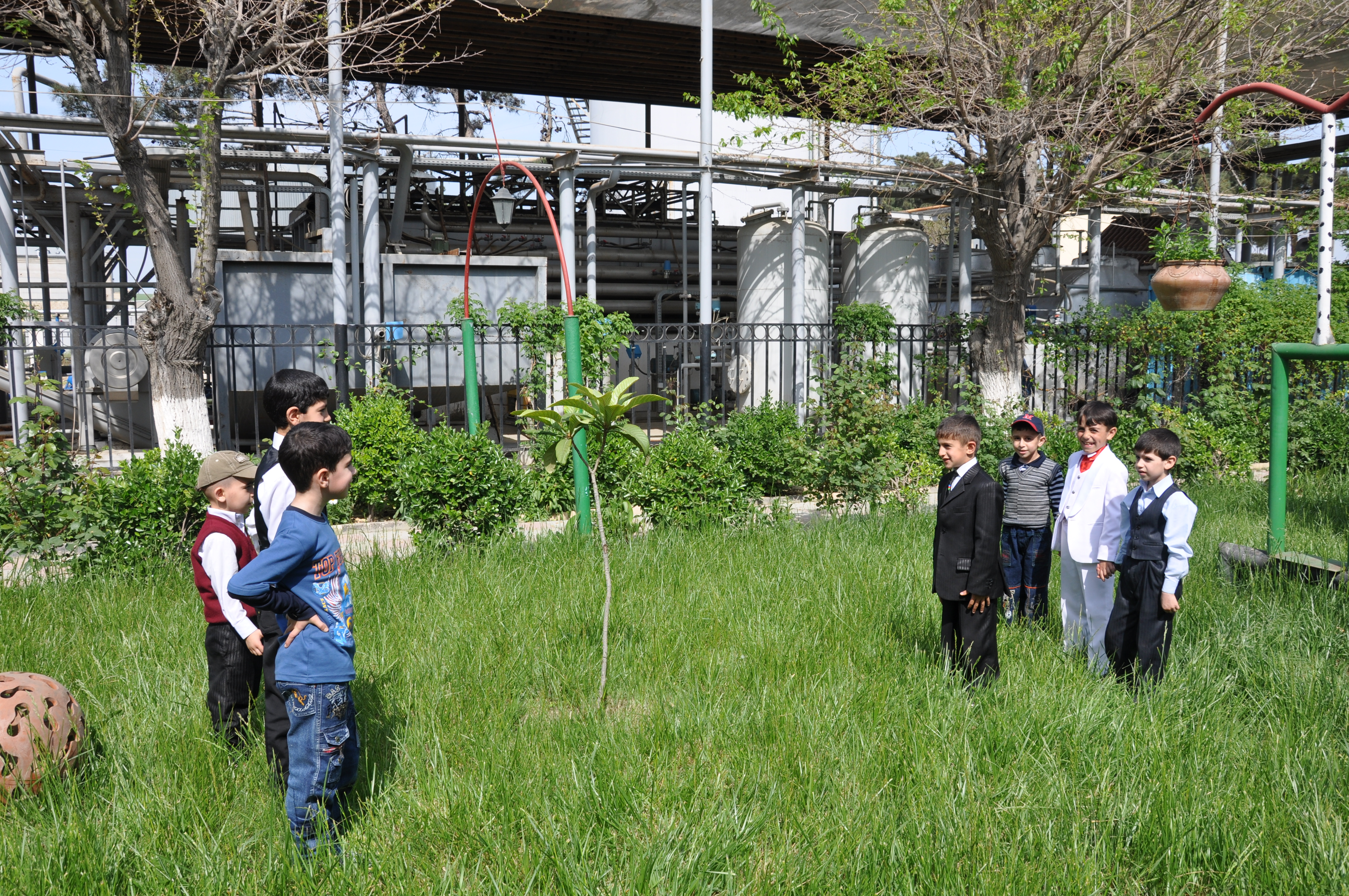 Öcəşmə — Azərbaycanda ən çox yazqabağı (bayramqabağı) günlərdə, eləcə də digər fəsillərdə əsasən uşaq və gənclər arasında, geniş şəkildə oynanılan qədim oyunlarından biridir.